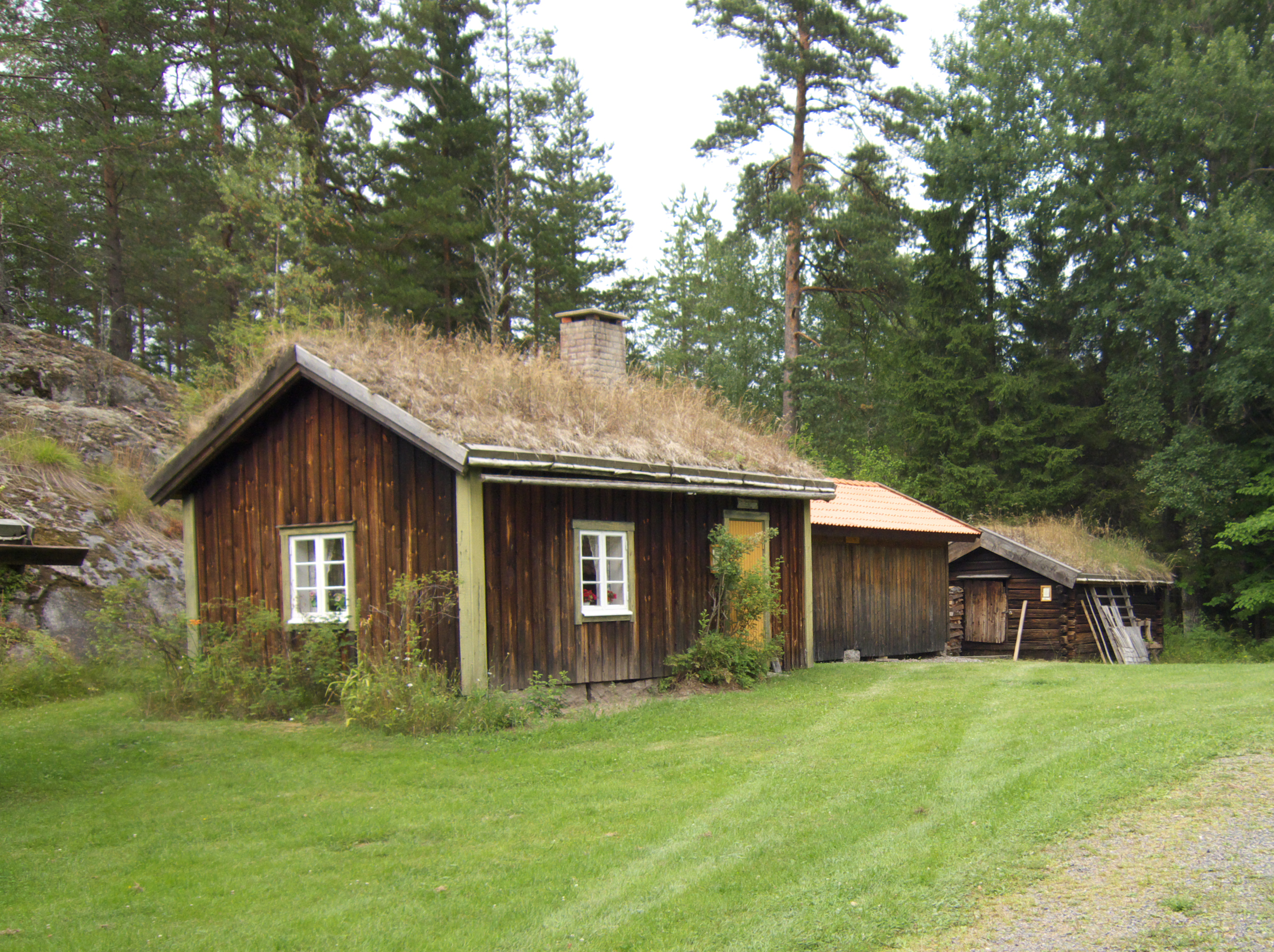 Tiveds hembygdsgård Dammtorp - "Heddastugan", stuga från Sannerud